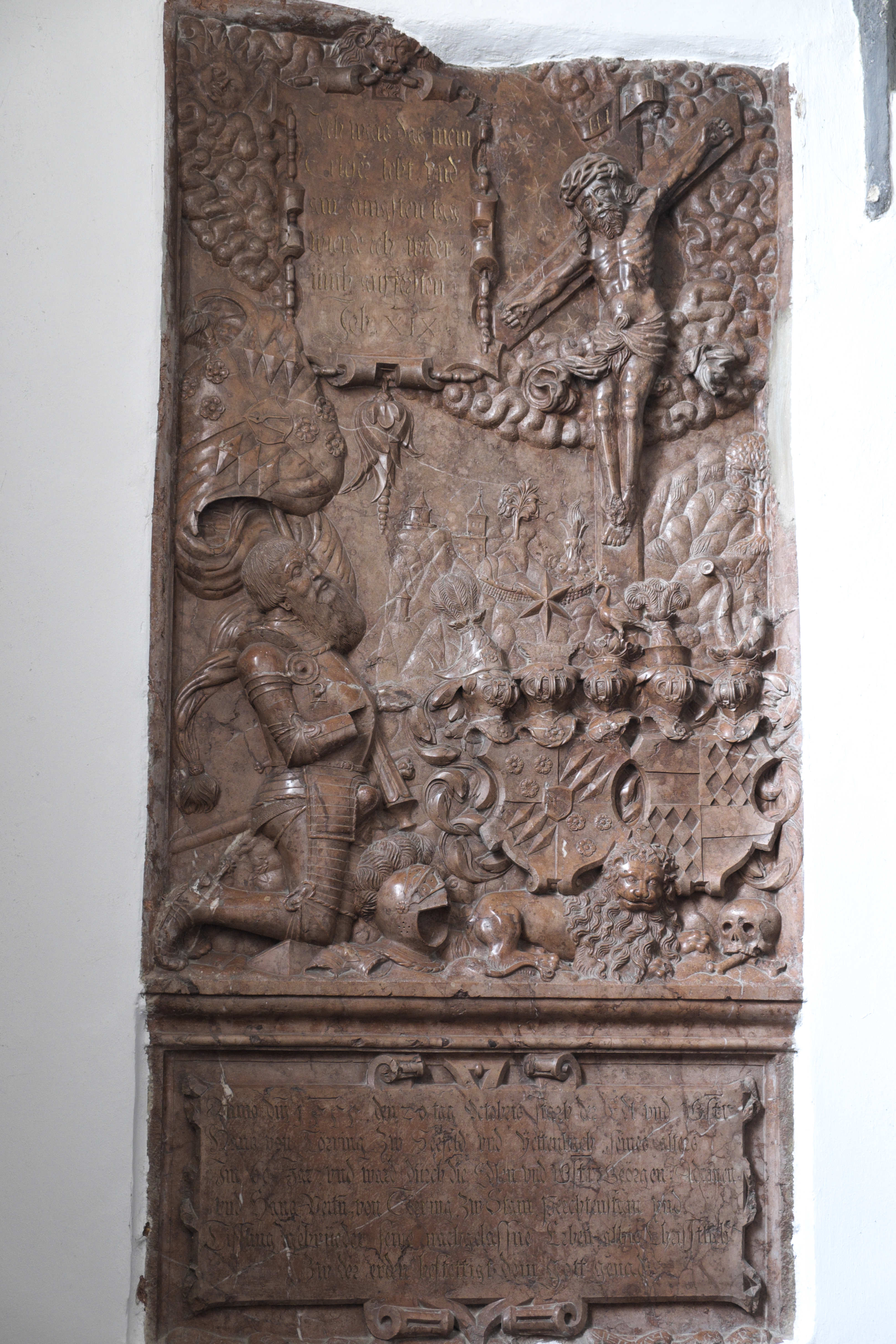 Katholische Pfarrkirche St. Peter und Paul in Oberalting, einem Ortsteil von Seefeld (Bayern/Deutschland), Epitaph für Hans von Toerring zu Seefeld († 1555), mit Allianzwappen Toerring und Stauff zu Ehrenfels (für seine Ehefrau Barbara von Stauff)